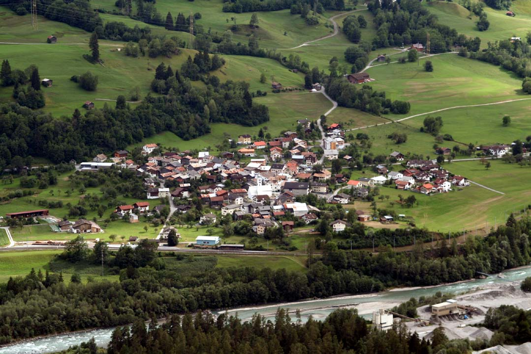 Castrisch von Falera aus gesehen